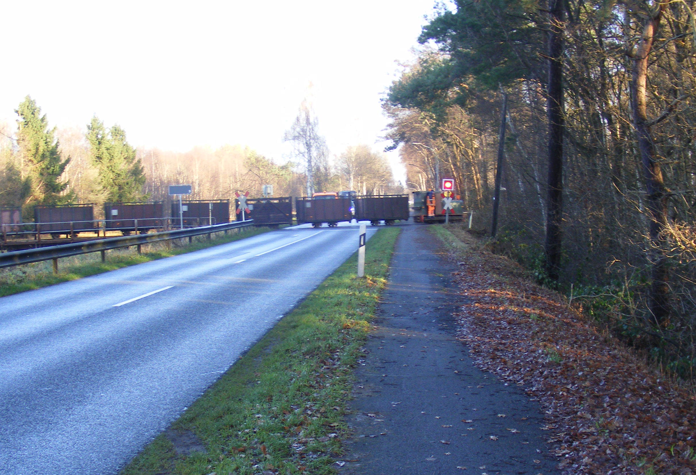 Gnarrenburger Torfeisenbahn beim Überqueren der Kreisstraße 102